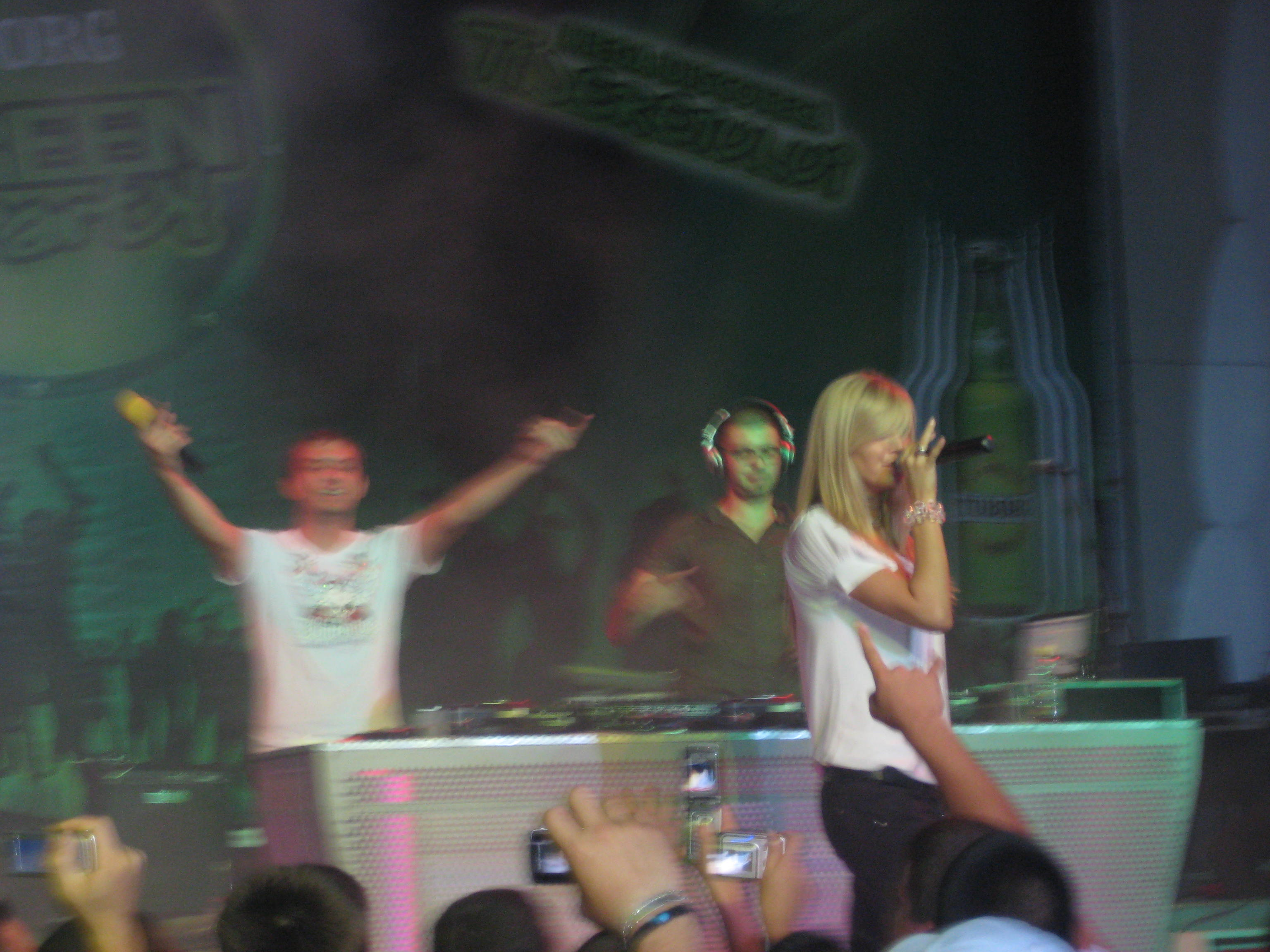 Activ at Mega Discoteca Tineretului